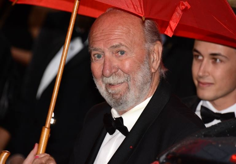 Jean-Pierre Marielle au festival de Cannes